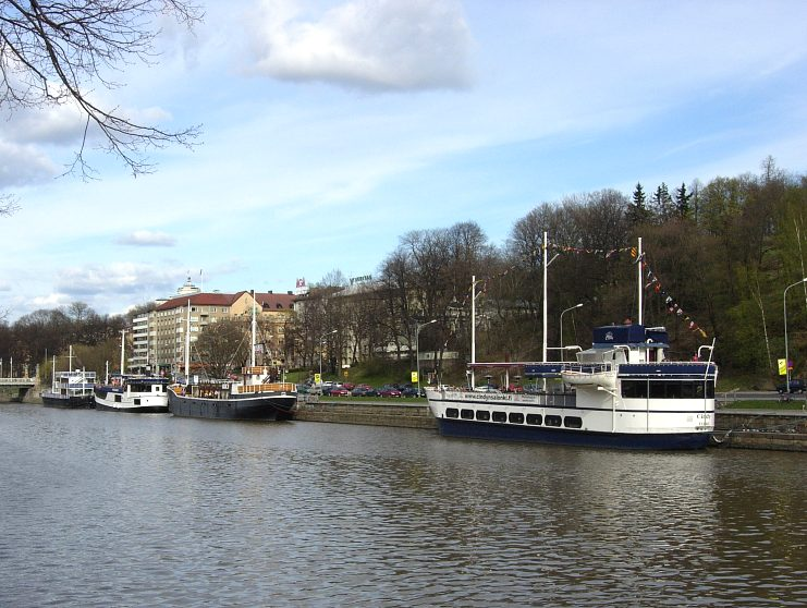 Restaurant boats in Aurajoki, Turku, Finland